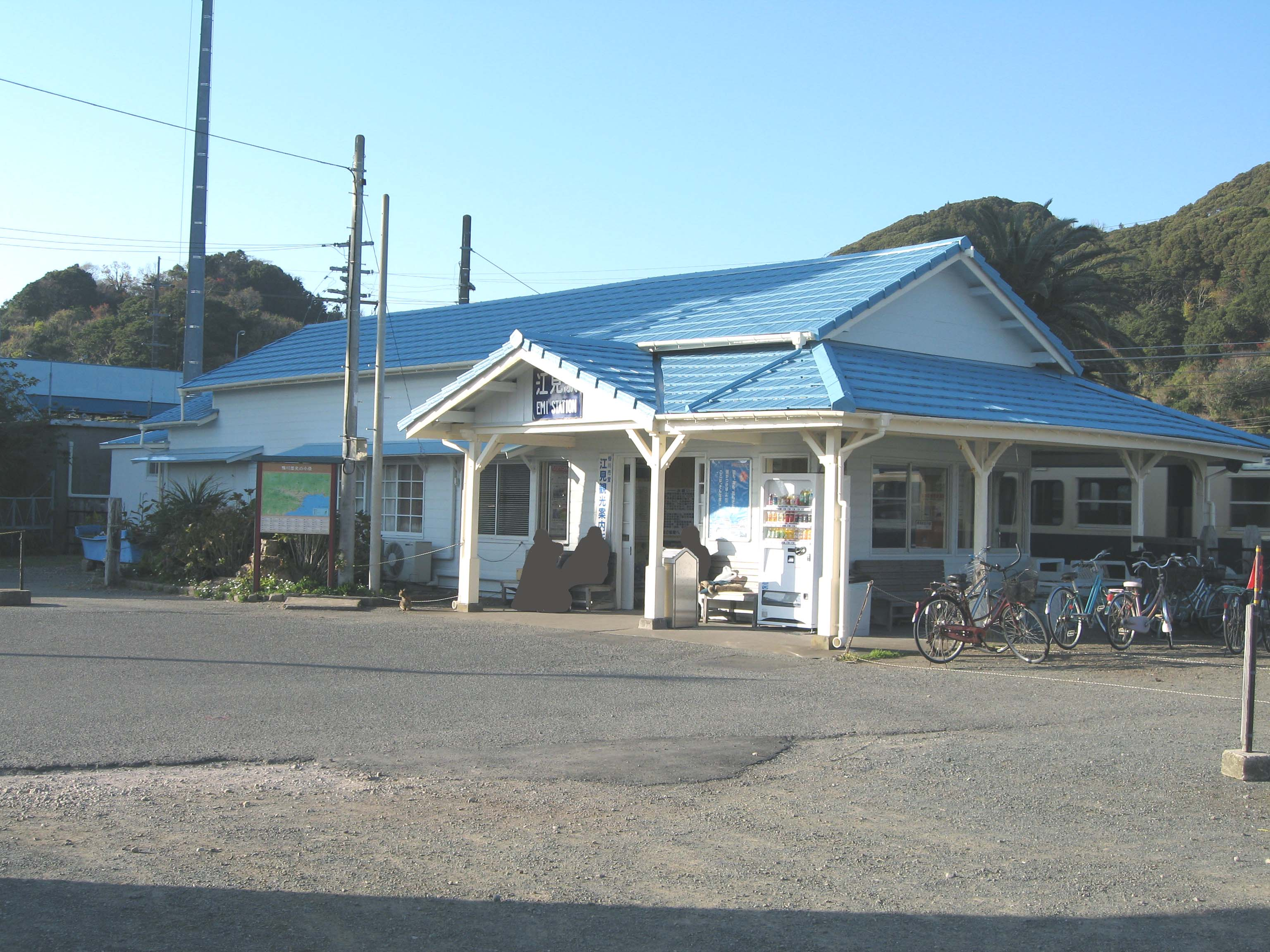 Emi station, Uchibo Line, Chiba, Japan, 江見駅駅舎